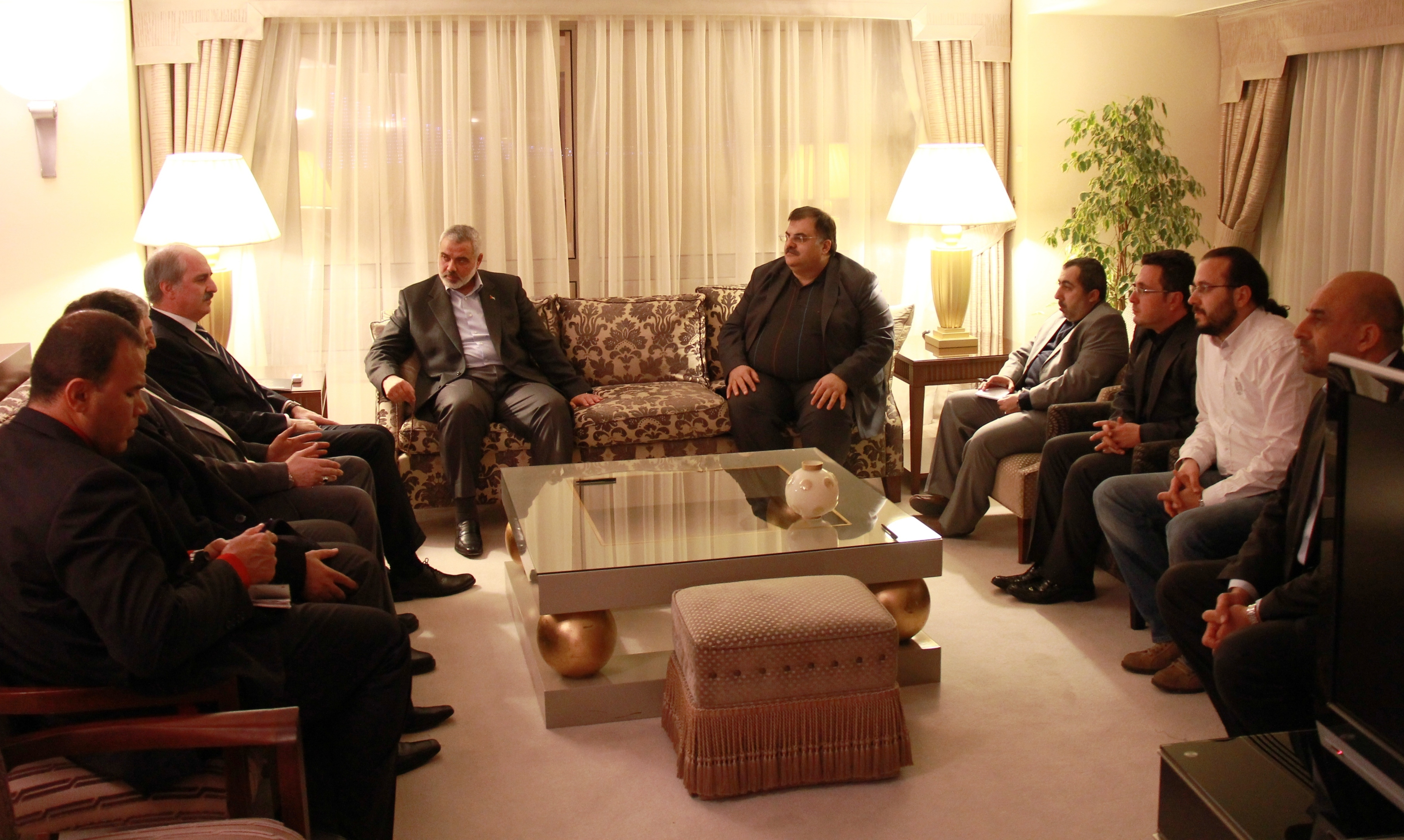 Erol Erdoğan, dönemin Filistin Başbakanı İsmail Haniye ile birlikte.